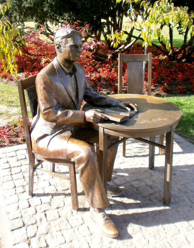 Pomnik Krzysztofa Kolbergera w Międzyzdrojach